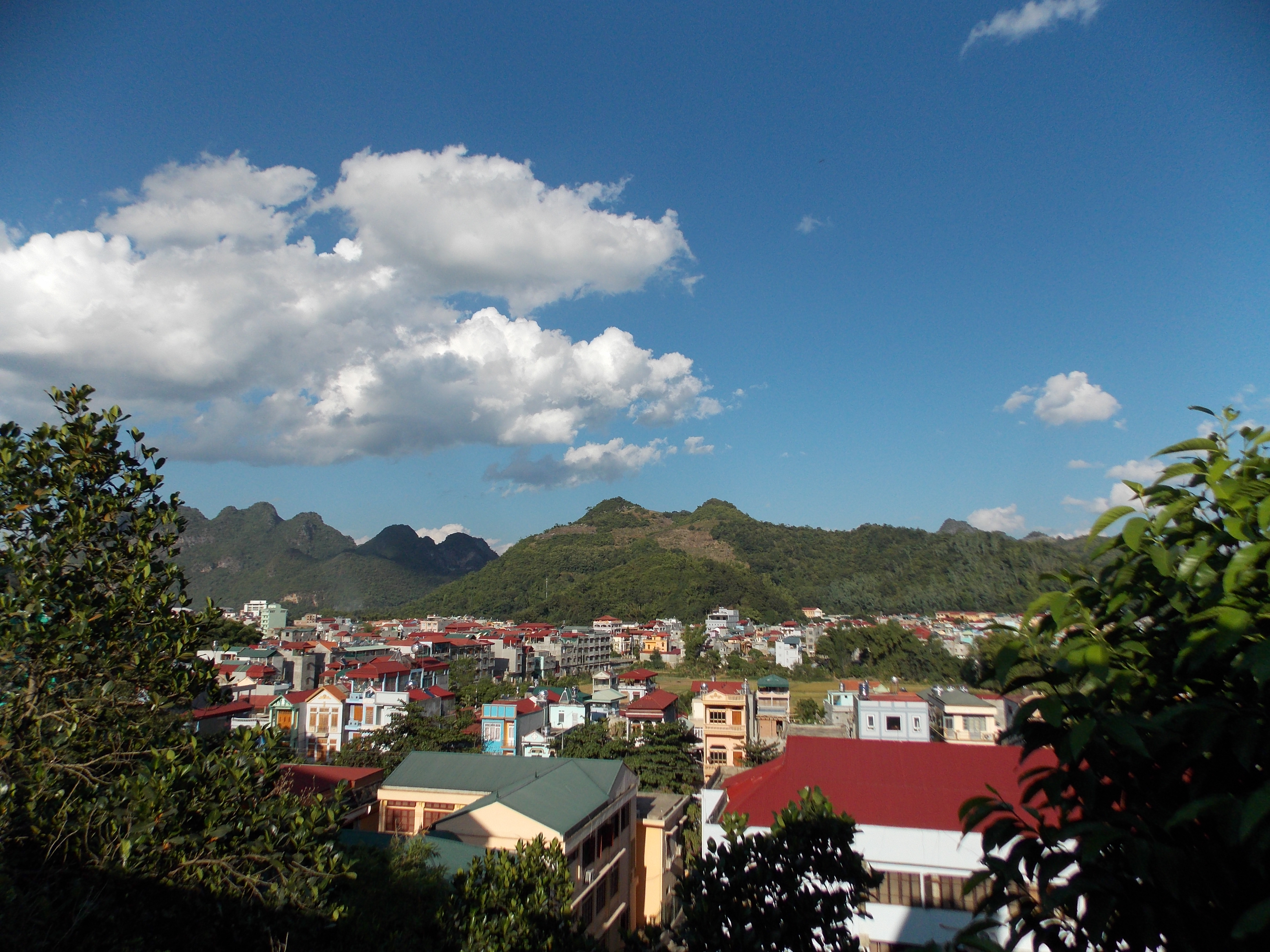 Phìn Ngan, Bát Xát, Lào Cai, Vietnam